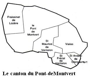 Le canton du Pont-de-Montvert Image personnelle